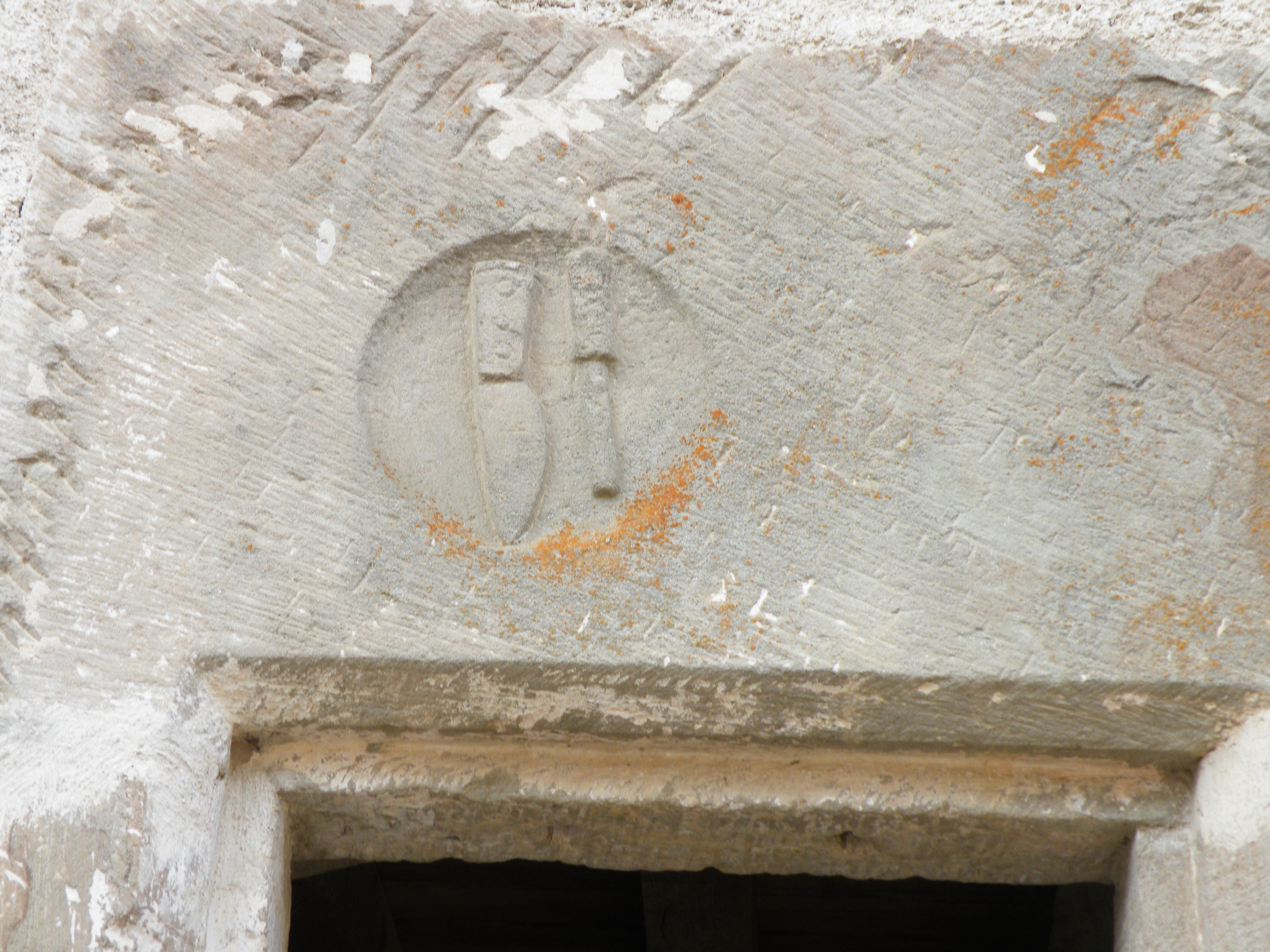 écu surmontant la porte de la Maison du boucher Châtillon-sur-Saône-Vosges.